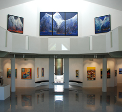 Gulden kunstverk: Galleriet